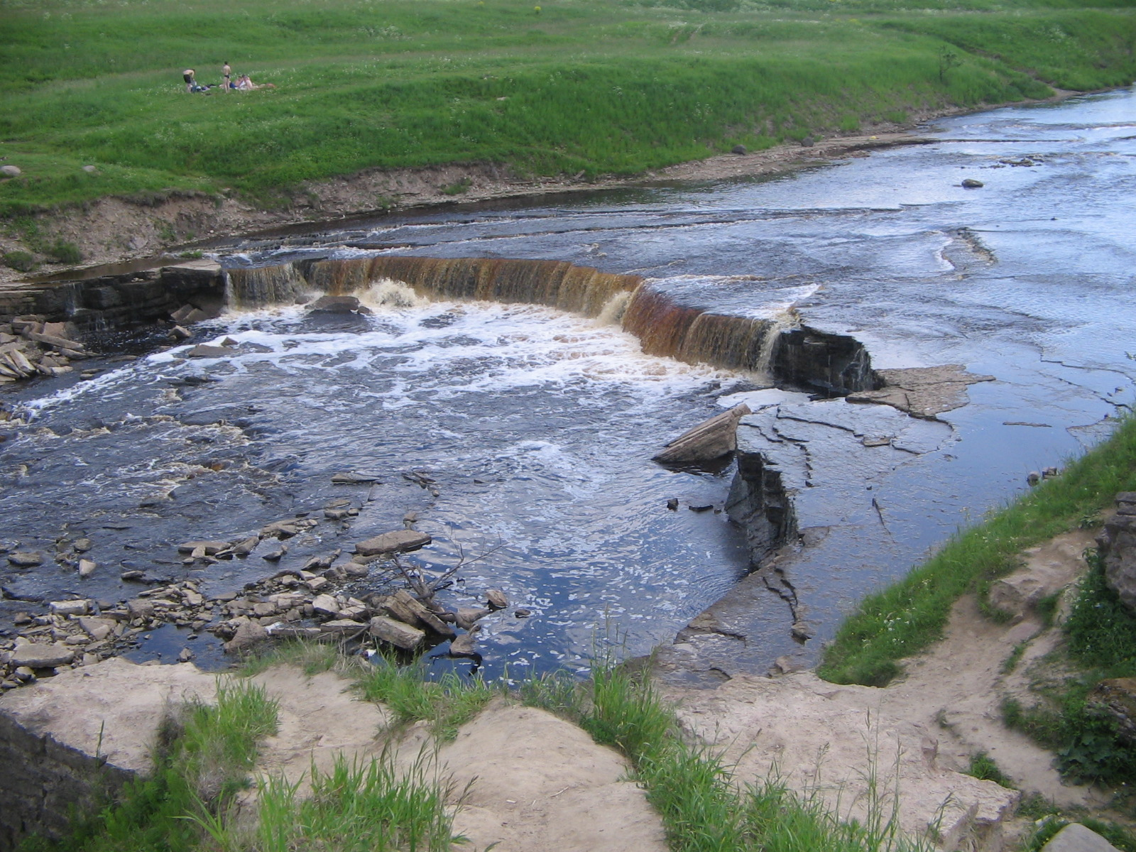 Тосненский водопад